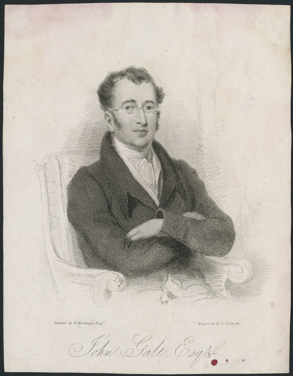 John Galt 1824. Porträtiert von Edward Hastings, lithographiert von Thomas Woolnoth. Credit: Library and Archives Canada, Acc. No. 1939-152. Copyright: Expired